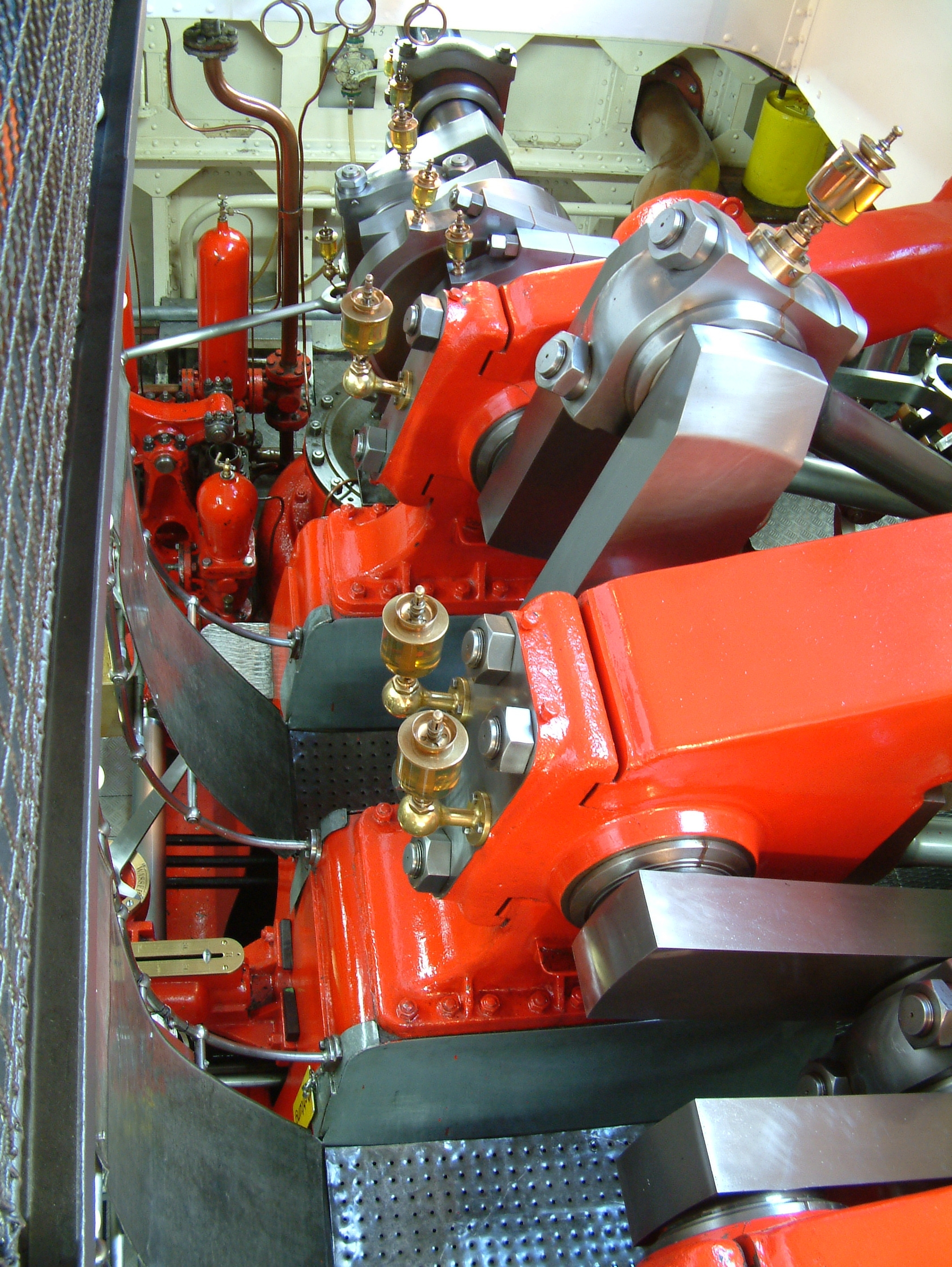 Steam engine 500PS "Raddampfer Stadt Rapperswil", Zürichsee, Switzerland